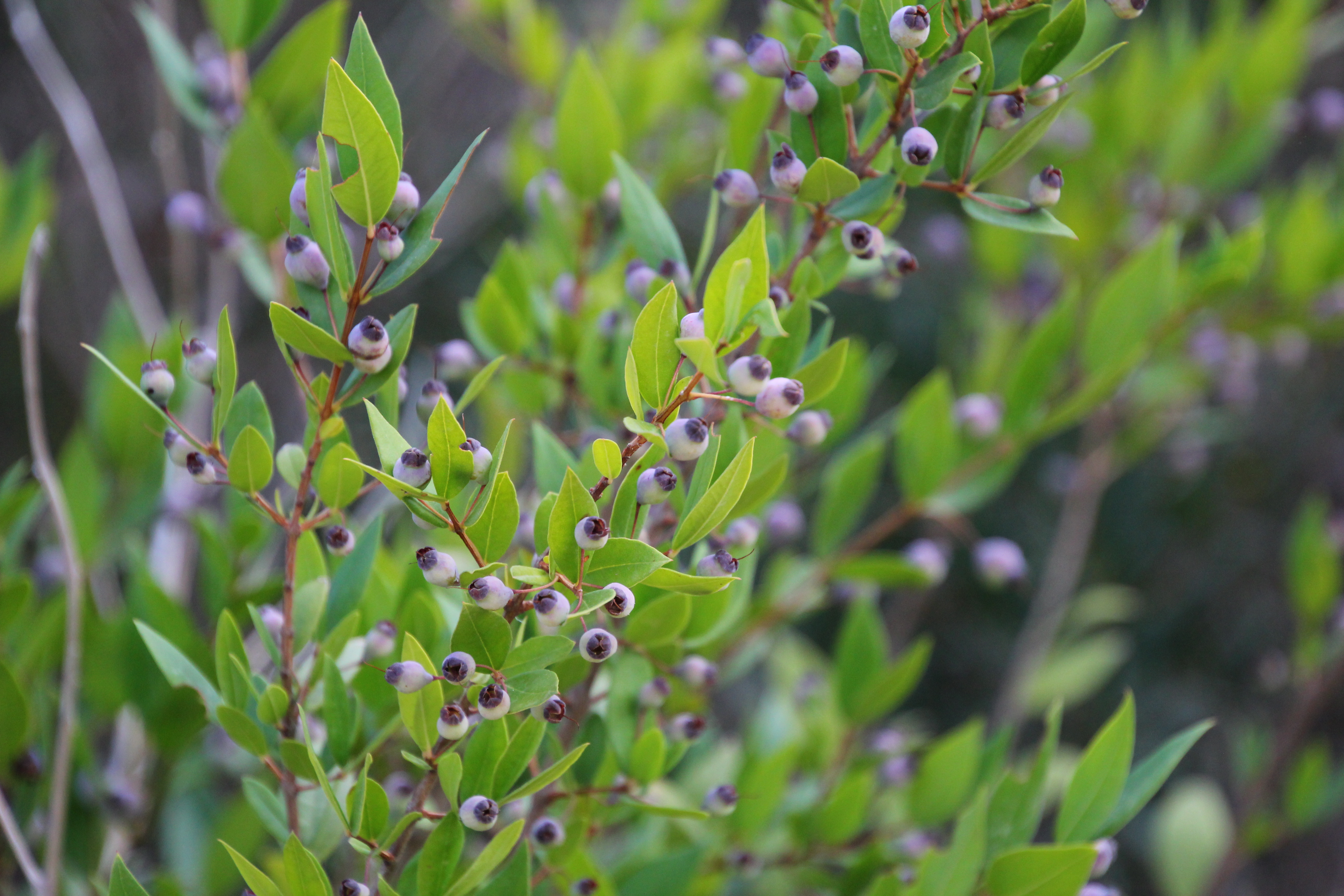 Flora della Sardegna